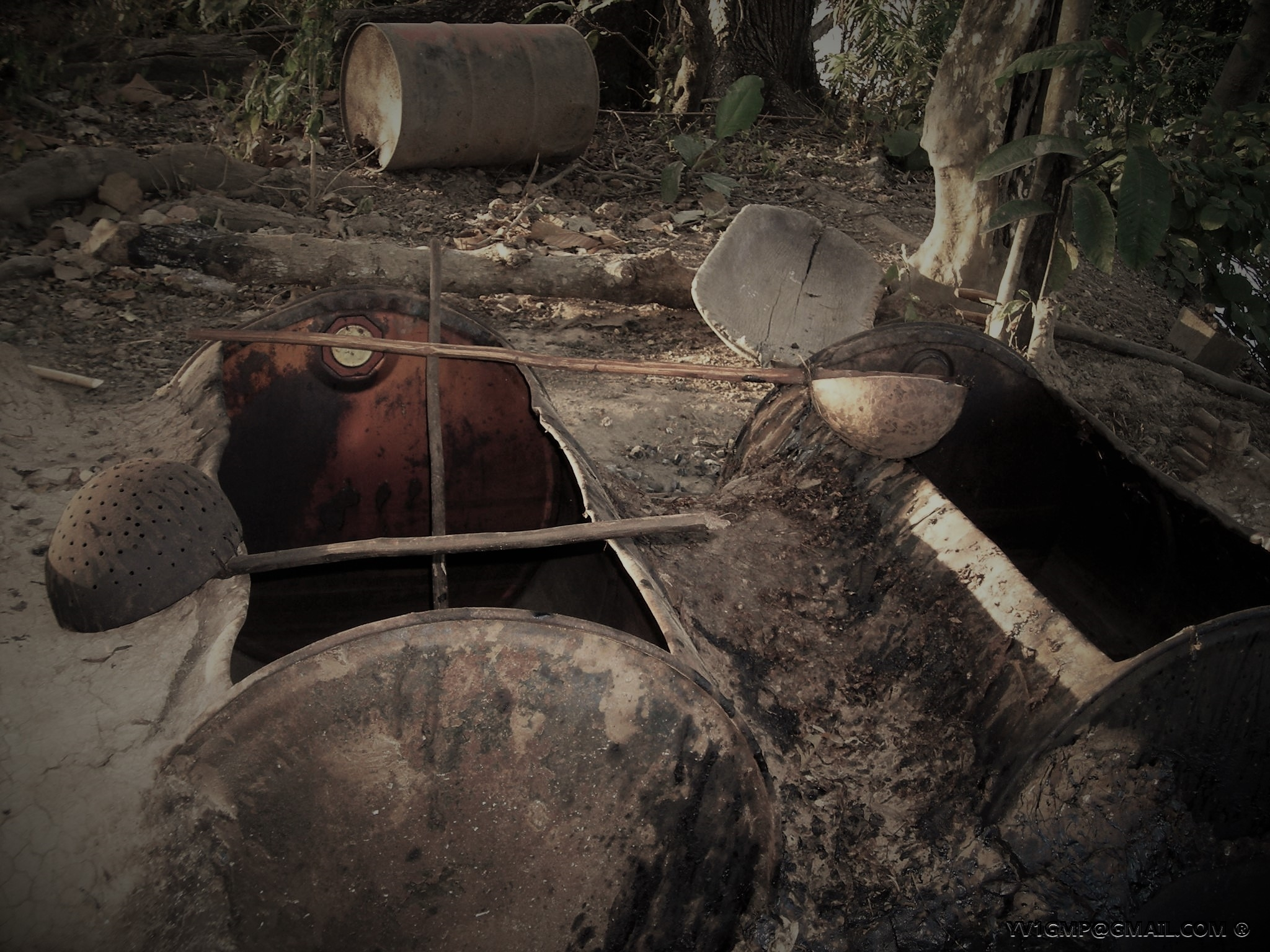 Fabrica artesanal para la elaboración del Chimó. En estos tambores a medio enterrar en el suelo donde es cocinado y hervido el tabaco durante horas para obtener la pasta con la que es elaborado el Chimó. Llano de Venezuela, Guanarito estado Portuguesa.